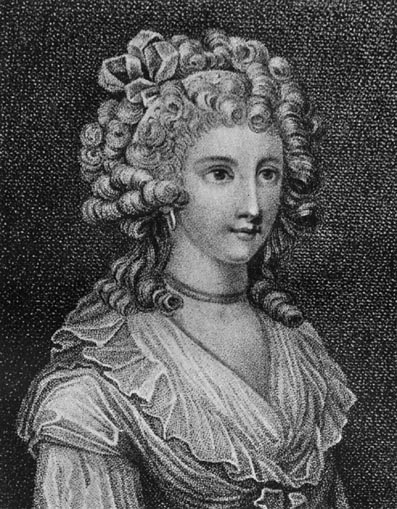 Marie-Thérèse-Charlotte van Frankrijk